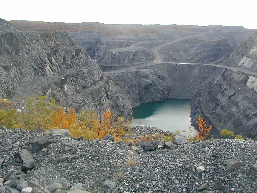 Dagbrot i Bjørnevatn